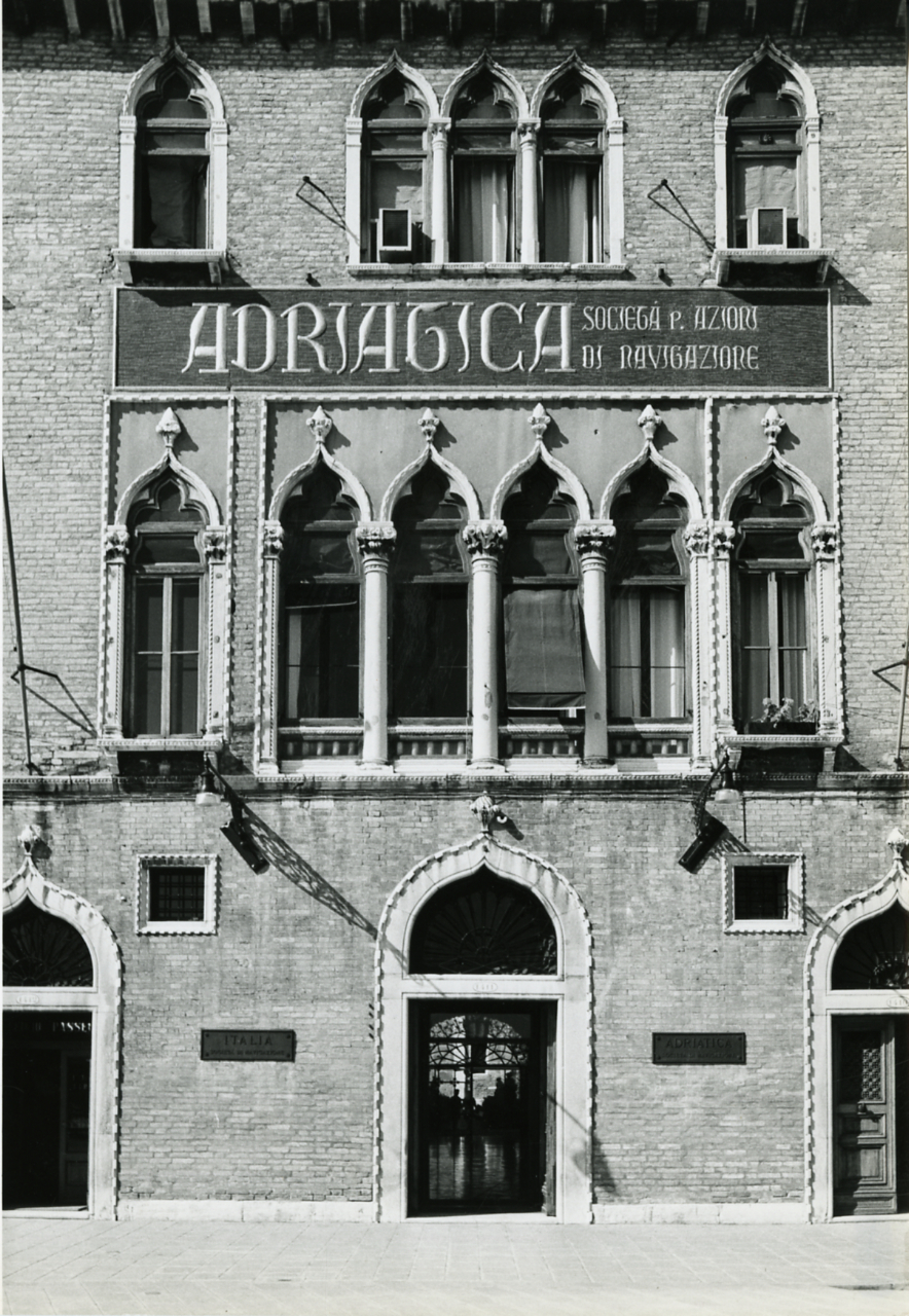 Servizio fotografico : Venezia, 1969 / Paolo Monti. - Stampe: 24 : Positivo b/n, gelatina bromuro d'argento/ carta, 24x30. - ((Al verso delle stampe manoscritti i numeri dei negativi corrispondenti (formato 35 mm) con indicazione del fotogramma: 803/30, 821/36, 823/15, 831/10, 831/16, 832/28, 832/30, 833/9, 848/24, 848/26, 862/35, 864/23, 864/25, 864/27, 865/9, 870/23, 871/4[tagliato?], 873/[tagliato], 876/16, 878/17, 879/68, 881/17, 882, 891/[tagliato]; iscrizioni didascaliche manoscritte a matita; timbro a inchiostro con copyright (Via Tasso - Milano). - Sul coperchio della scatola iscrizione didascalica manoscritta a pennarello nero: "Venezia gotica". - Occasione: Documentazione per la pubblicazione: Arslan Edoardo, "Venezia gotica: architettura civile gotica veneziana", Milano, Electa, 1970. - Fonte: Monografia di Arslan, Edoardo: Venezia gotica: architettura civile gotica veneziana, Milano, Electa (1970)